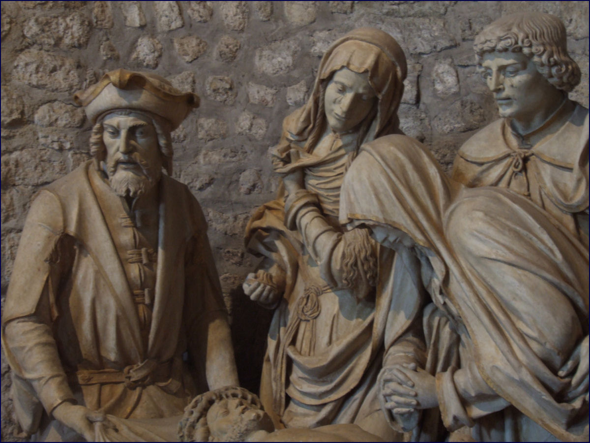 Basilique Saint-Remi (Basilica St. Remigius), Reims, France